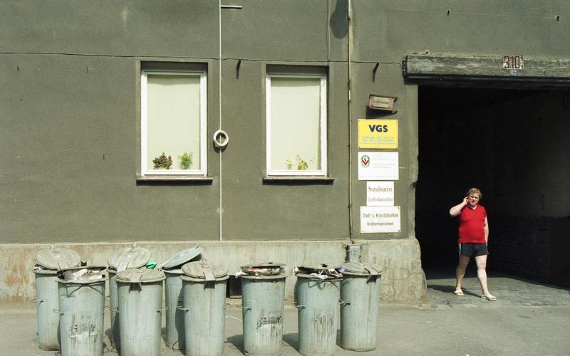 11.-18.8.1991 Bundesland Sachsen-Anhalt, Gräfenhainichen Stadtmotive